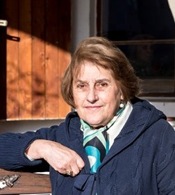 Eva Nováková (2019)